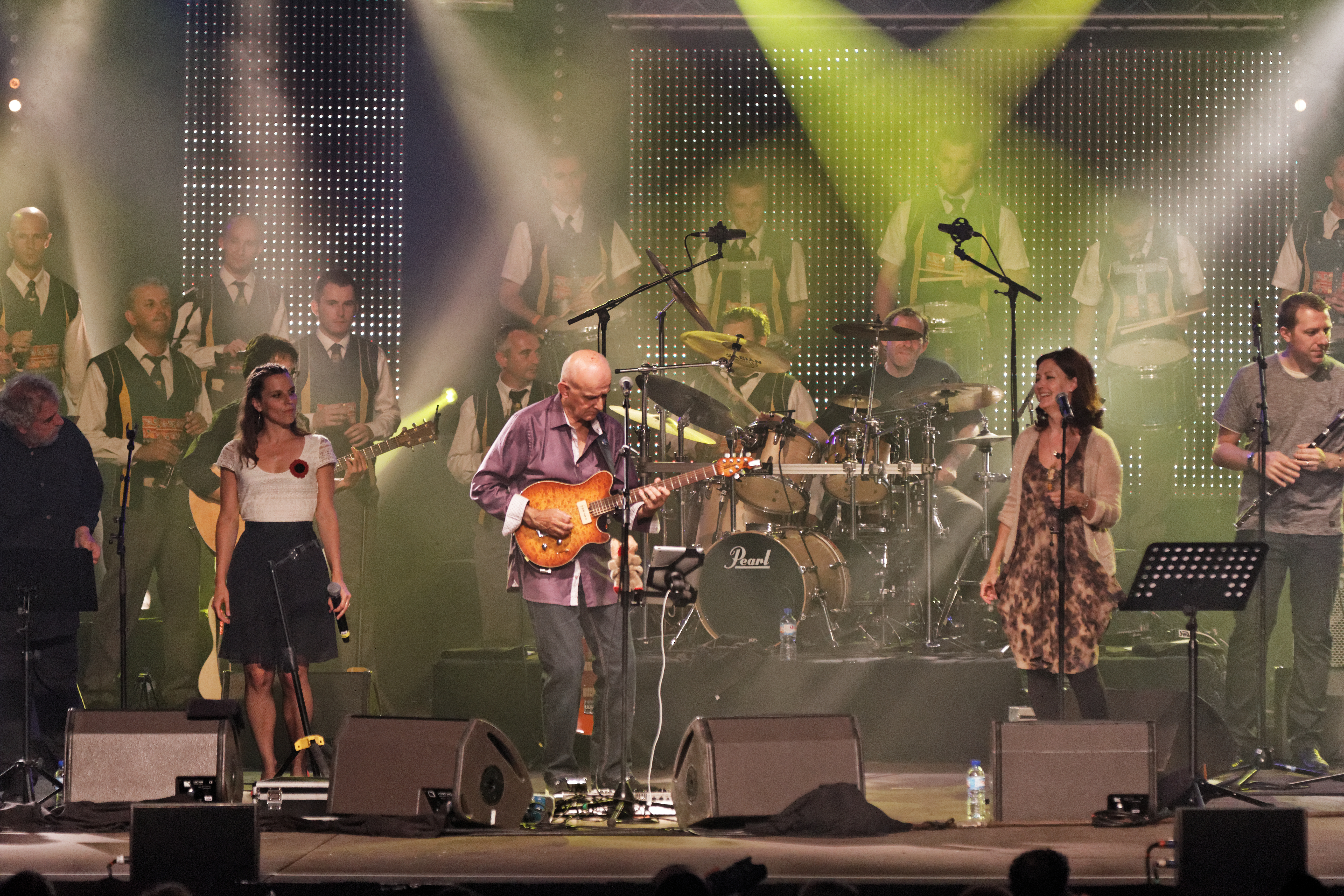 Dan ar Braz en concert sur la scène Gradlon lors du festival de Cornouaille 2013.